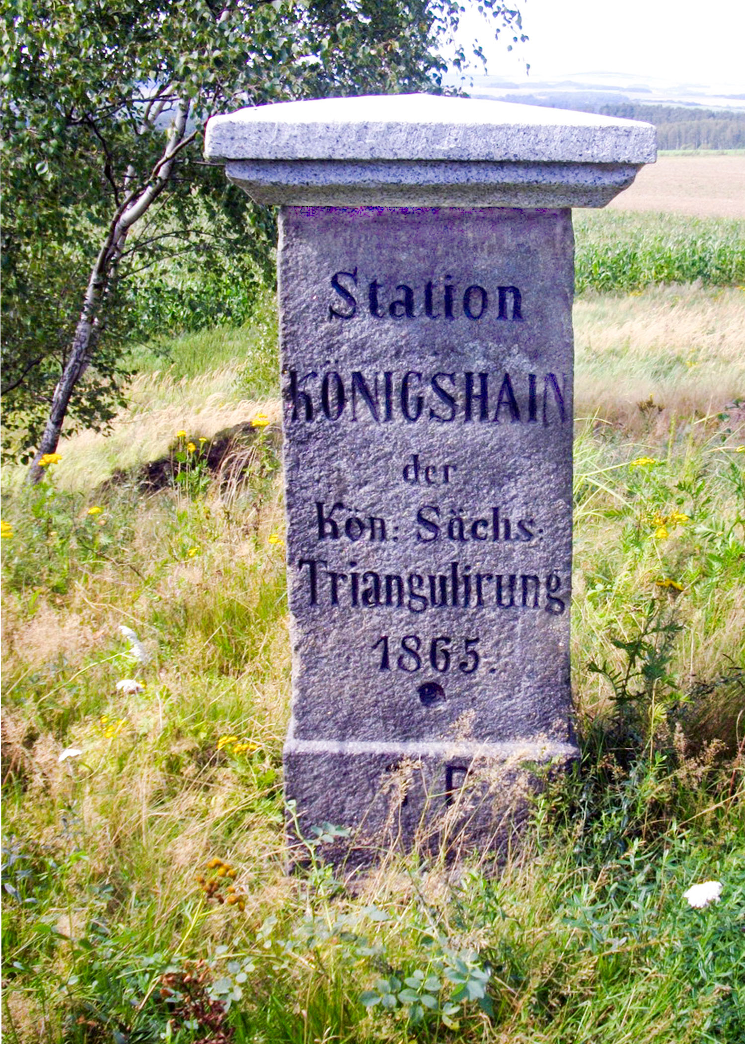 Königlich-Sächsische Triangulation Station 37 Königshain Vermessungspunkt II. Ordnung